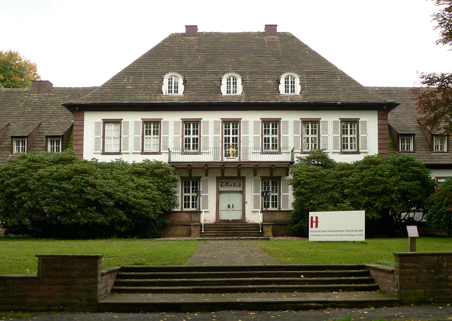 xcvxcv